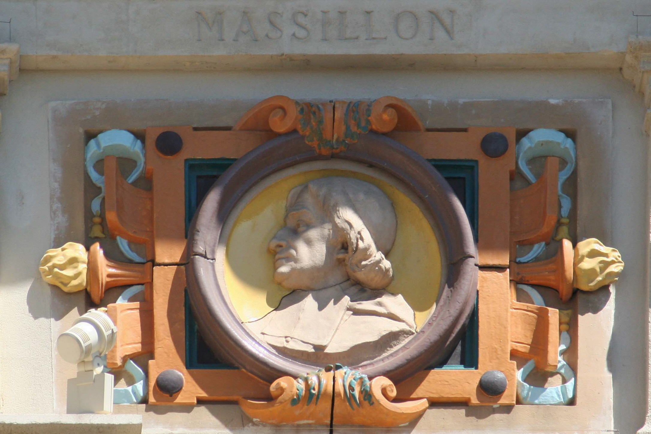 Médaillon de Jean-Baptiste Massillon sculpté par Victorien Bastet situé sur la façade de l'aile "bibliothèque" du musée d'art de Toulon.